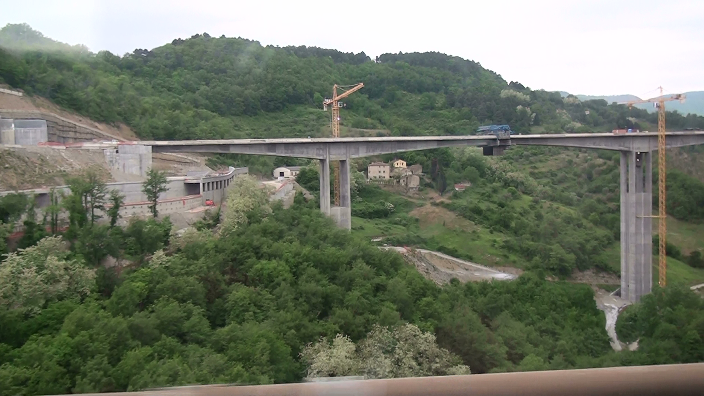 修建中的大桥1